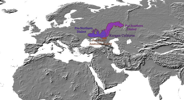 Indo-European hypothetical homeland.